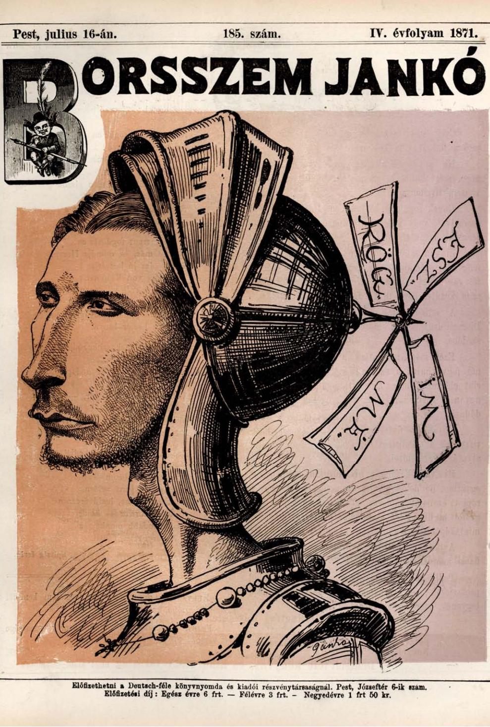 A Borsszem Jankó című élclap 185.száma, 1871. július 16. Címlapján gúnyrajz Apponyi Albertről.